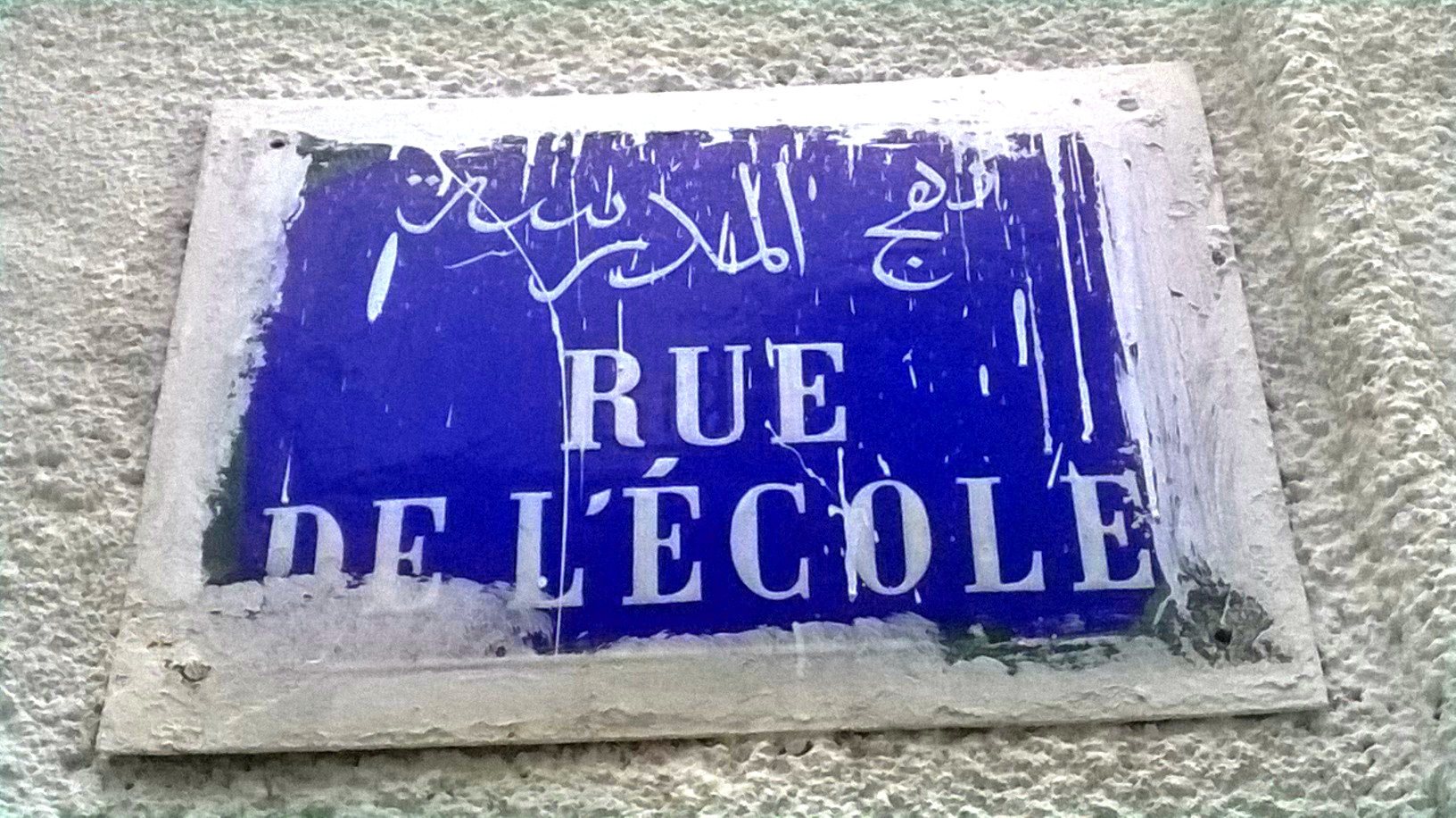 Bab Jedid, médina de Tunis, Tunisie باب الجديد، مدينة تونس العتيقة ، تونس